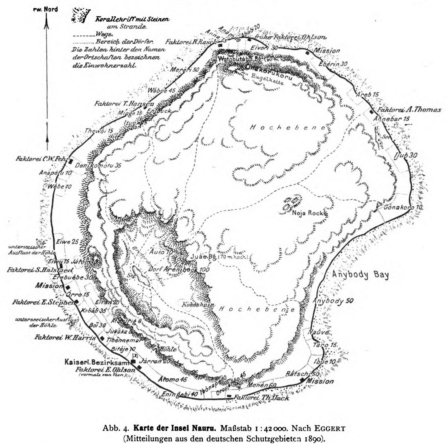 German colonial map of Nauru (1914)